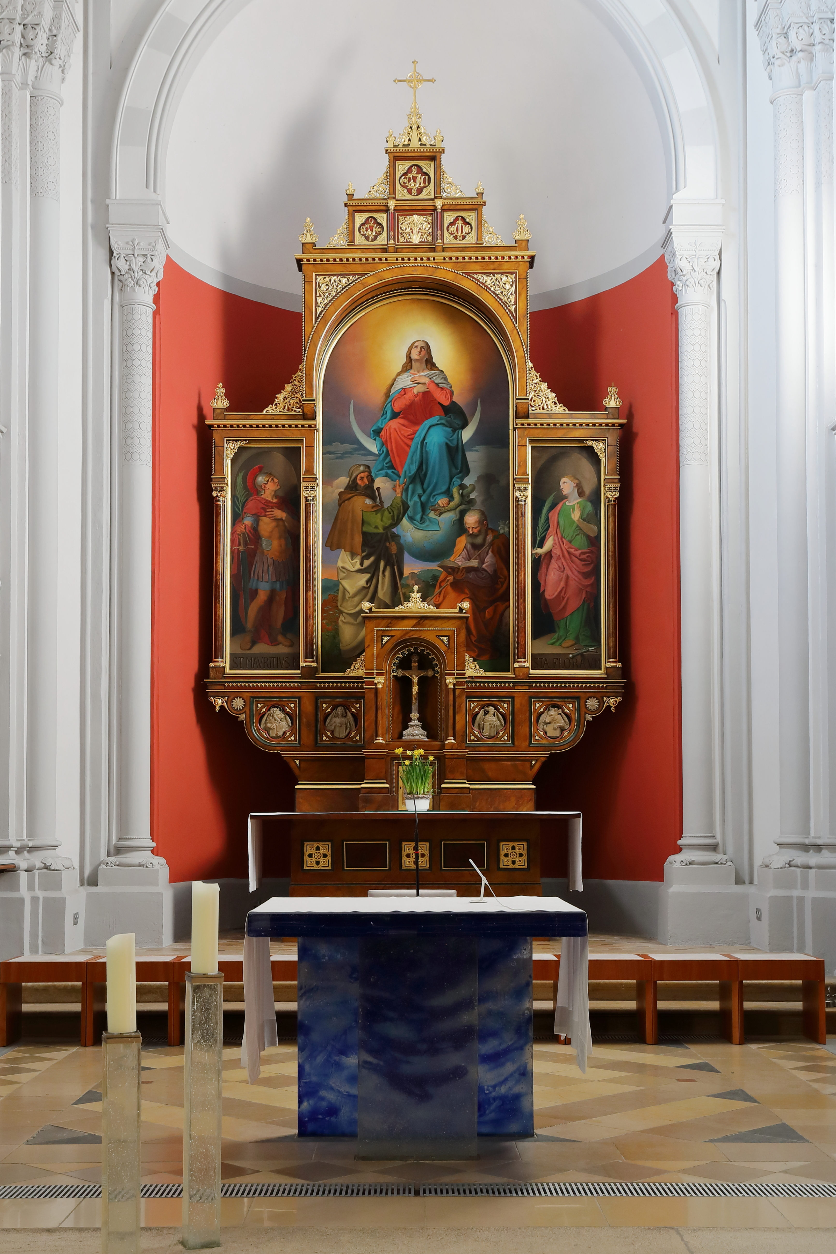 Hochaltar der röm.-kath. Stadtpfarrkirche hl. Jakobus der Ältere in der niederösterreichischen Stadtgemeinde Bad Vöslau.Der Hochaltar wurde nach einem Entwurf des Architekten Franz Sitte gefertigt. Die Altarblätter in dem dreiteiligen Retabel wurden 1869/70 von Joseph von Führich gemalt. Das Hauptbild stellt die hl. Maria Immaculata auf der Mondsichel mit den hll. Jakobus d. Ä. und Josef dar und die Seitenbildern die hll. Mauritius und Flora.